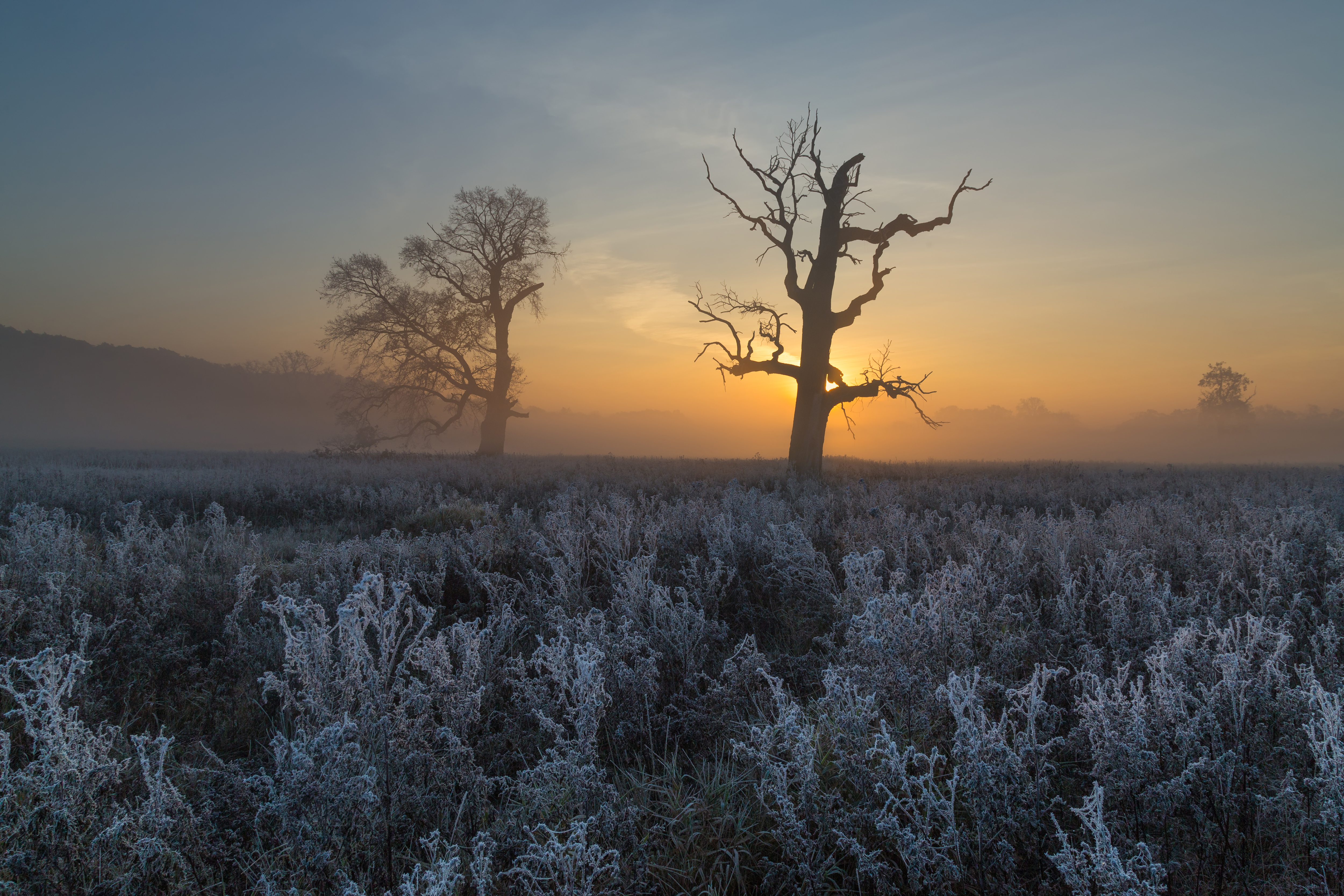 Park krajobrazowy: Rogaliński Park Krajobrazowy This is a photography of protected area with CRFOP ID PL.ZIPOP.1393.PK.66